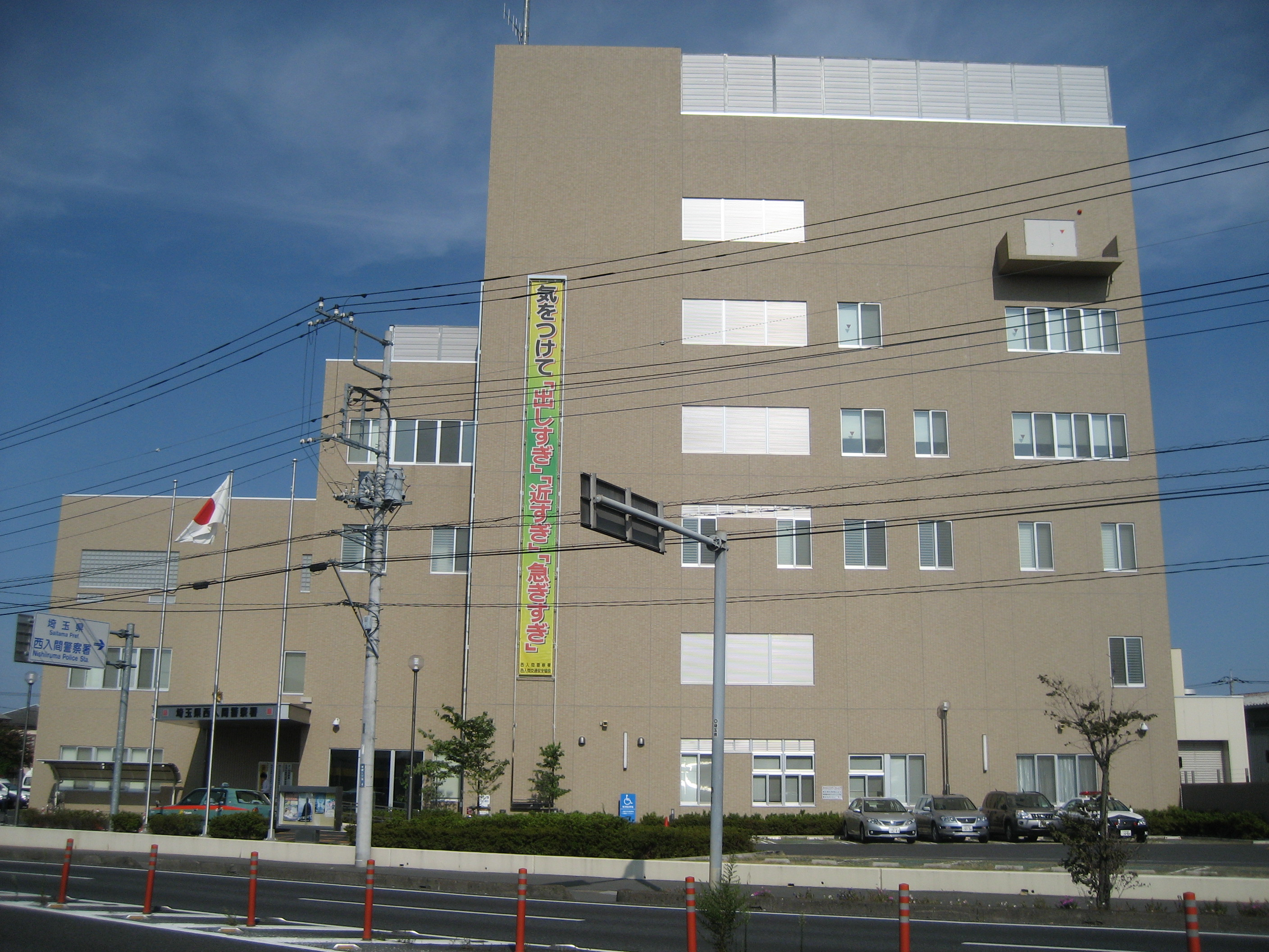 埼玉県西入間警察署庁舎（建物西側より撮影）